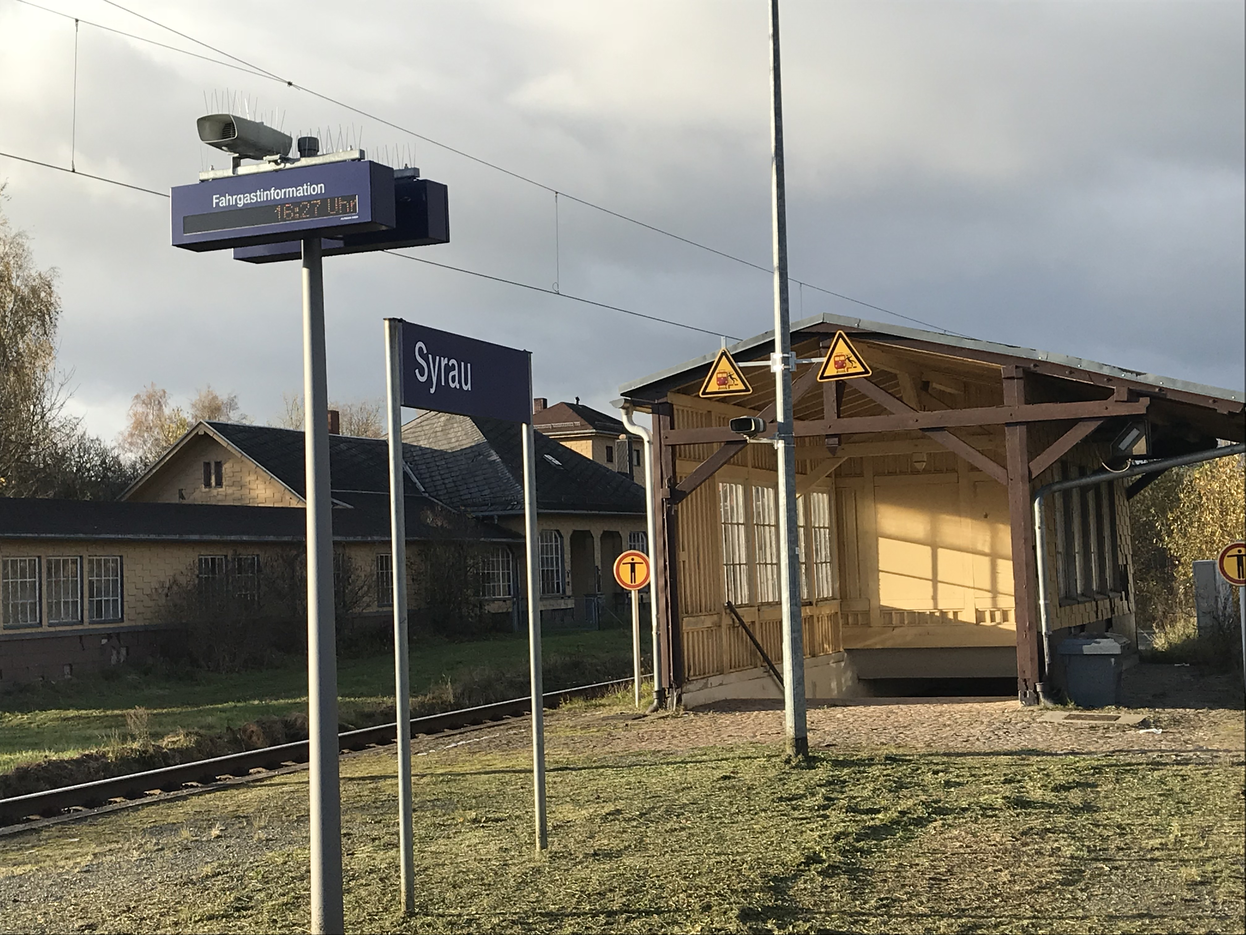 Haltepunkt Syrau mit Empfangsgehäuse (2017)